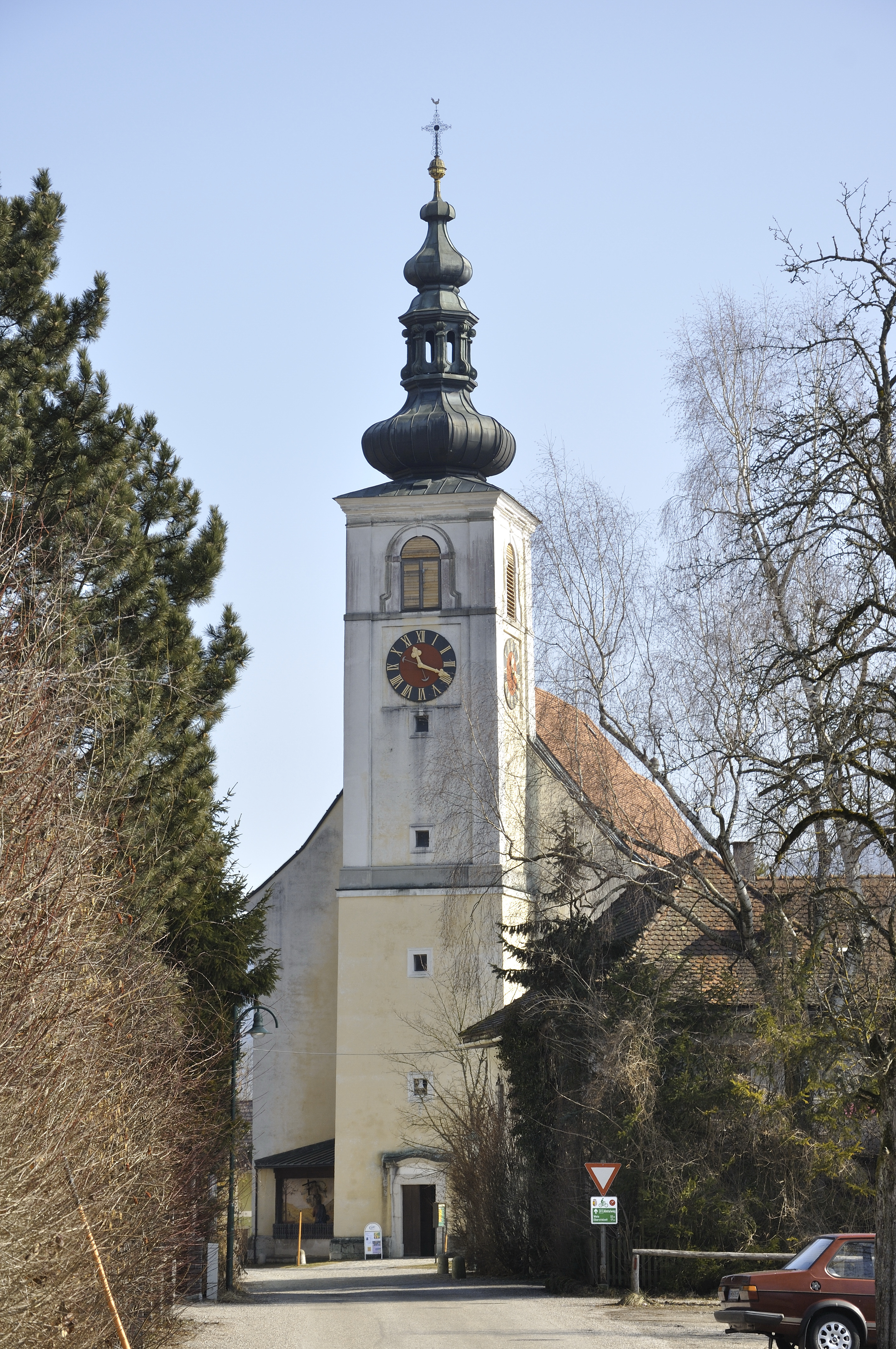 Pfarrkirche Viechtwang, Westseite